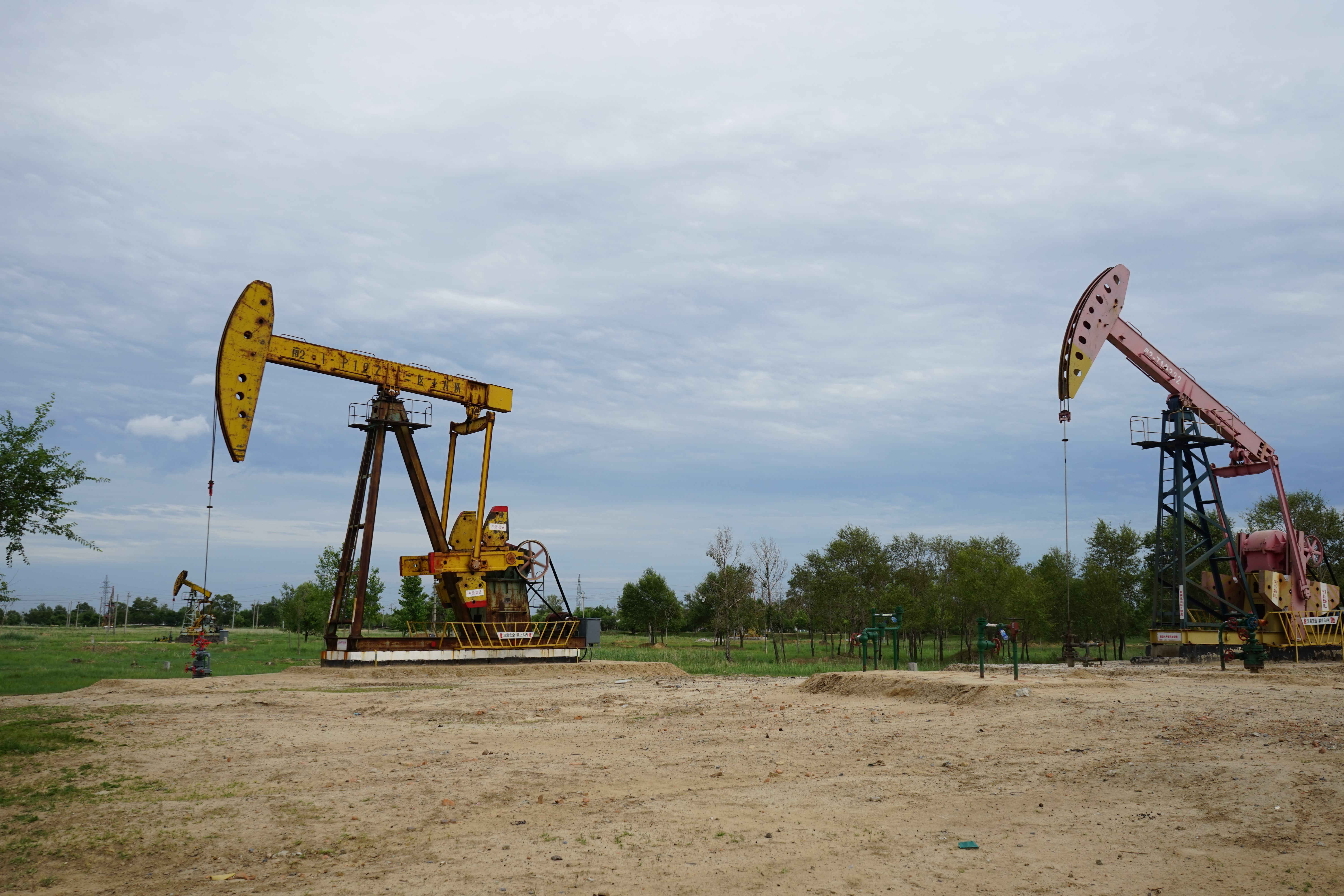 大庆油田第二采油厂第五作业区的抽油机。铁人第一口井附近